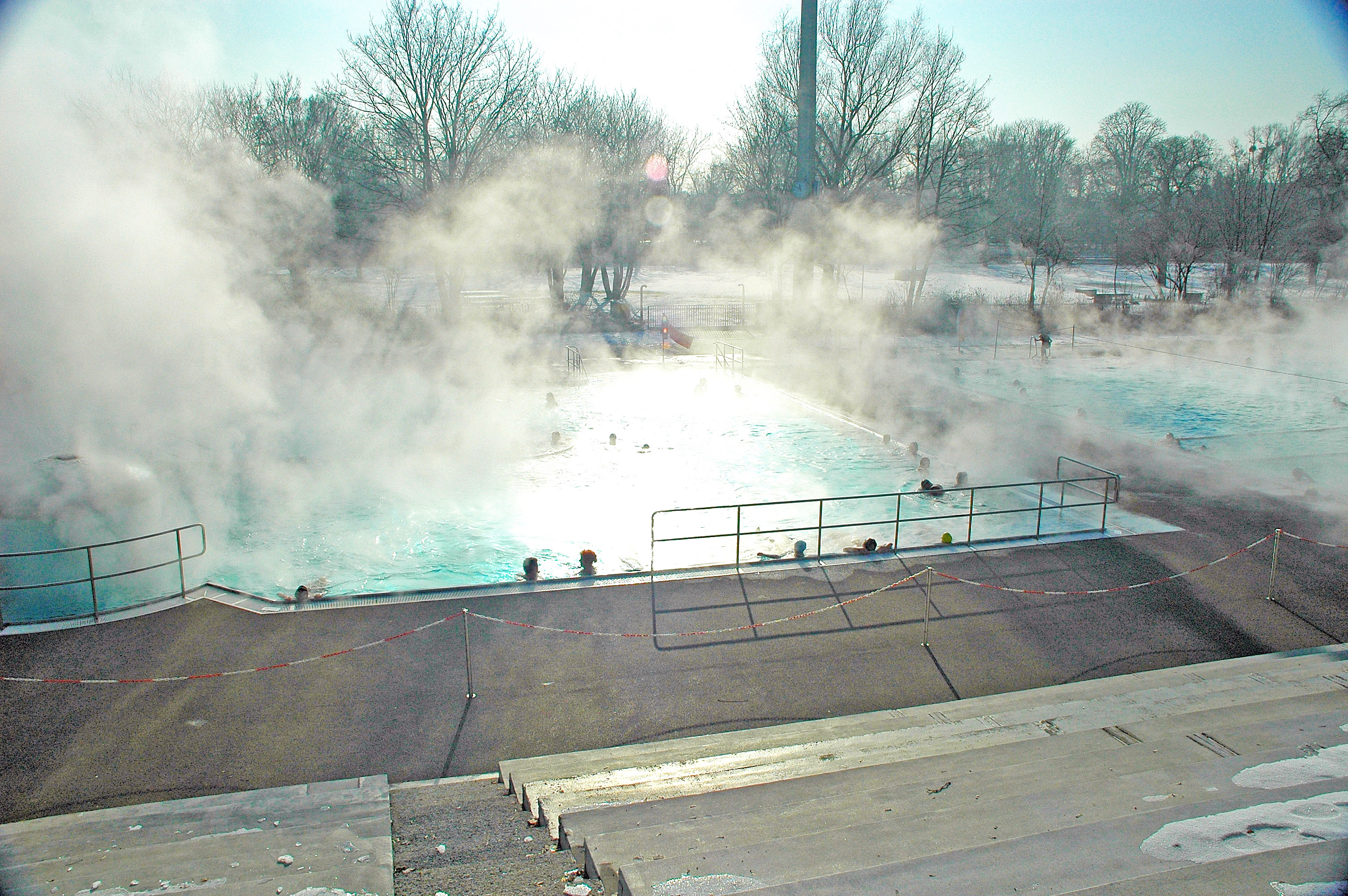 Dantebad in München-Freibadebetrieb im Winter